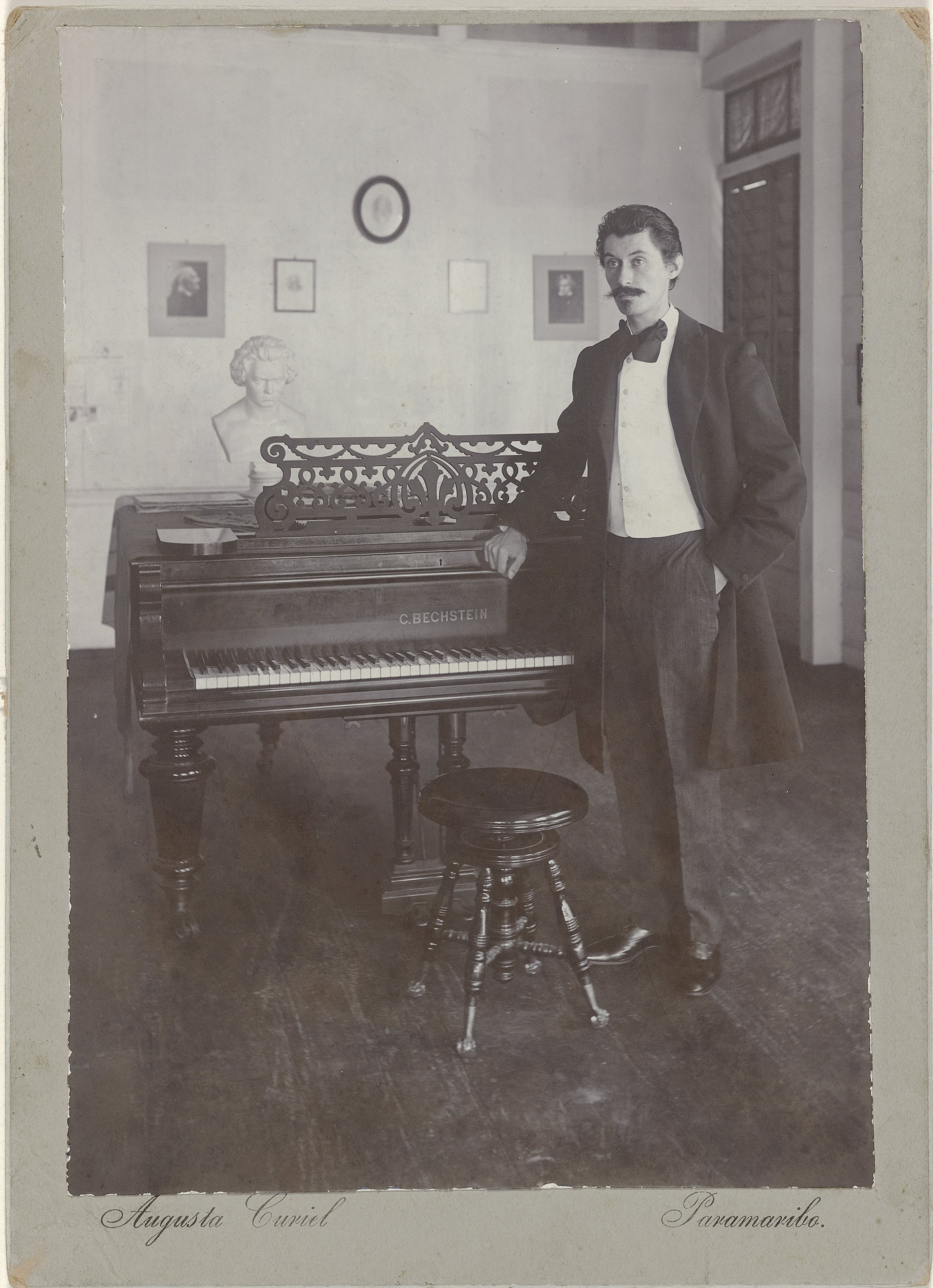 IdentificatieTitel(s): Portret van Aleidus Coenen, componistObjecttype: foto Objectnummer: NG-2010-111Omschrijving: Geposeerd portret van een man met snor, leunend tegen een Bechstein vleugel.VervaardigingVervaardiger: fotograaf: Augusta Curiel (vermeld op object)Plaats vervaardiging: ParamariboDatering: 25-aug-1907Materiaal: karton fotopapier Techniek: fotografieAfmetingen: h 175 mm × b 130 mmOnderwerpWat: portrait of composergrand pianoWaar: SurinameWie: Aleidus CoenenVerwerving en rechtenCredit line: Schenking van Uri Premselaar KunstzaakVerwerving: schenking 10-jun-2010Copyright: Publiek domein